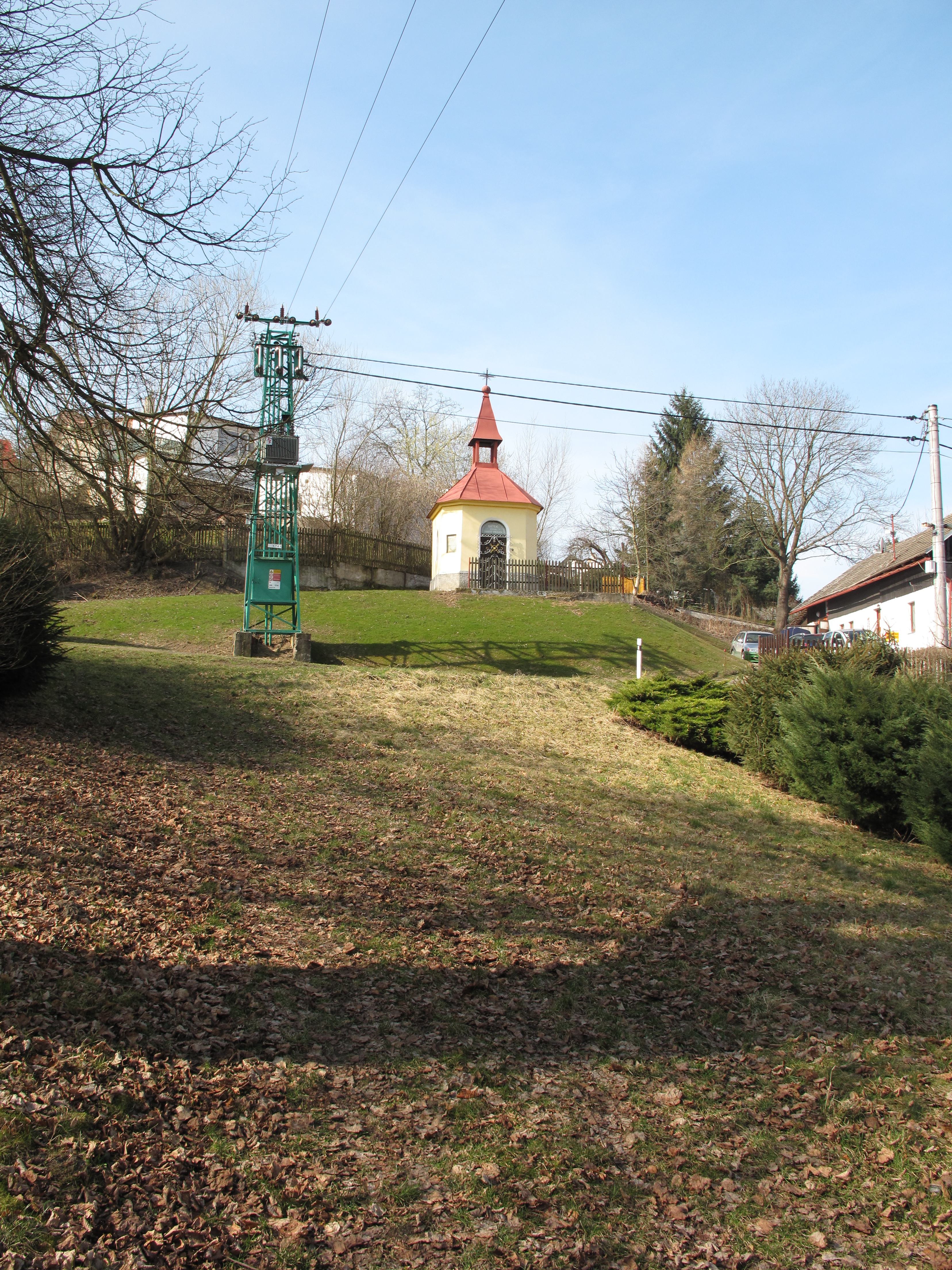 Kaplička v Sychrově. Okres Mladá Boleslav, Česká republika.